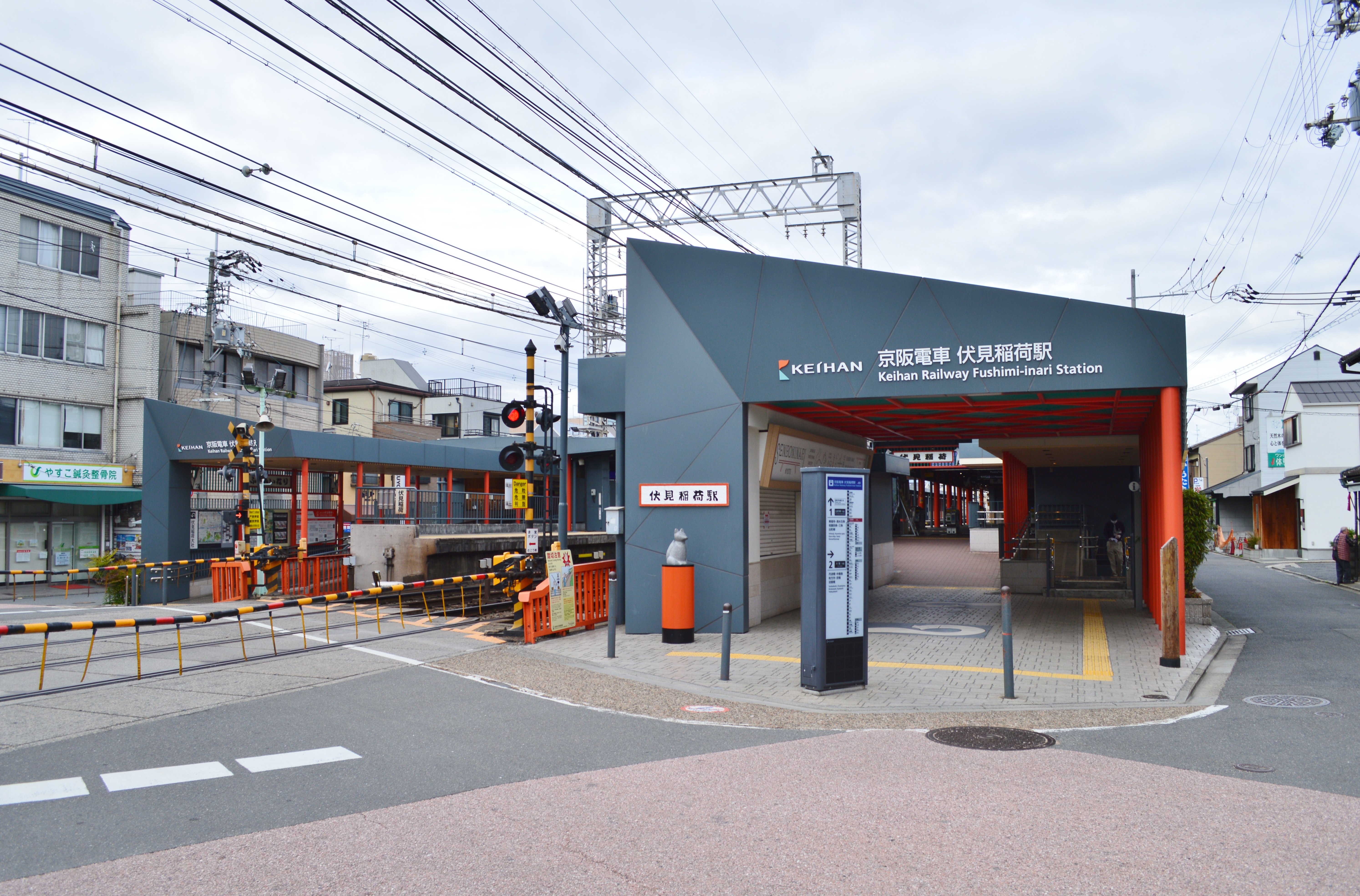 伏見稲荷駅 駅舎